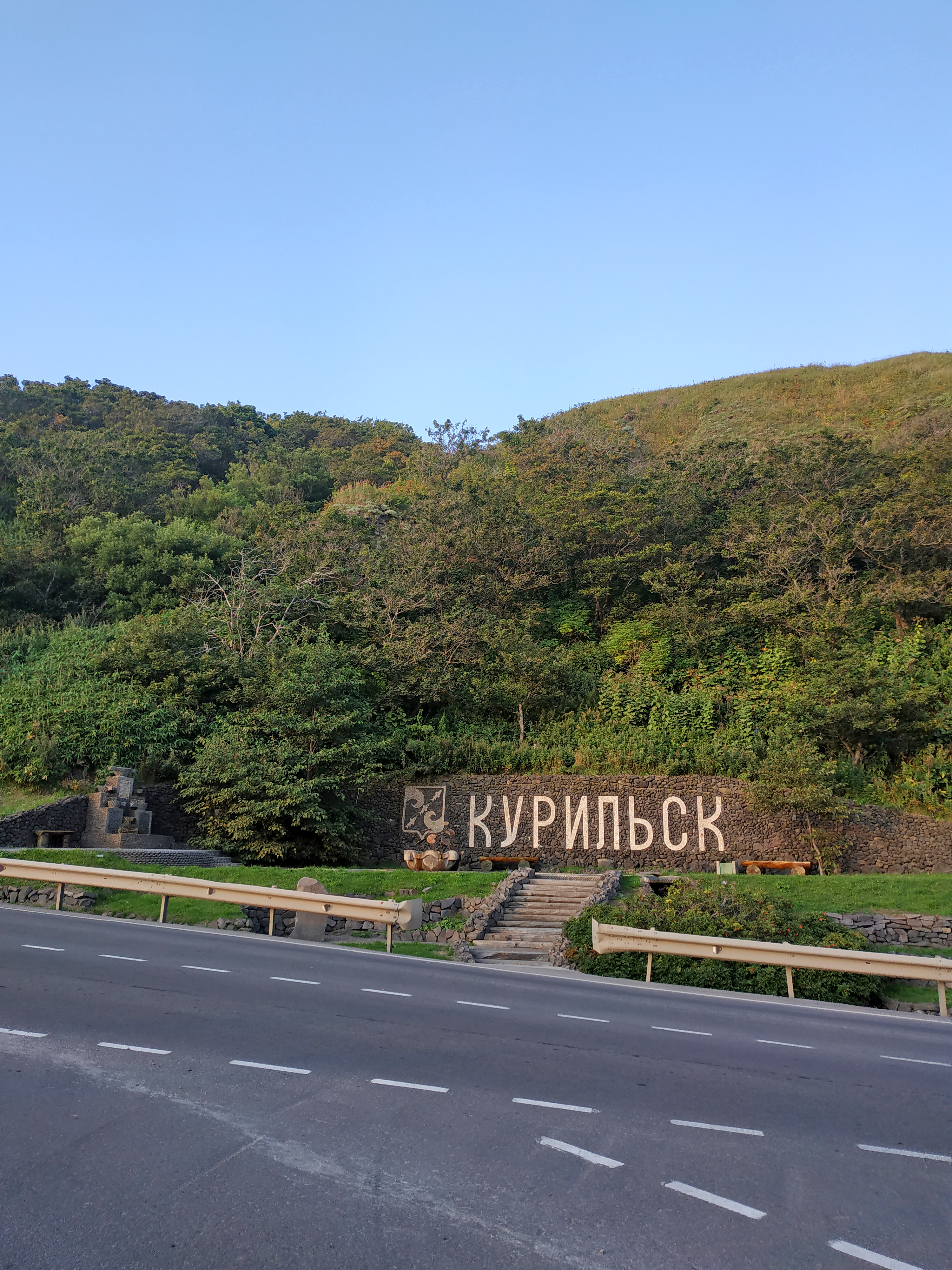 Сквер в Курильске